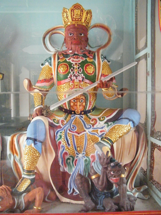 汕头 达濠 青云禅寺 南方增长天王像